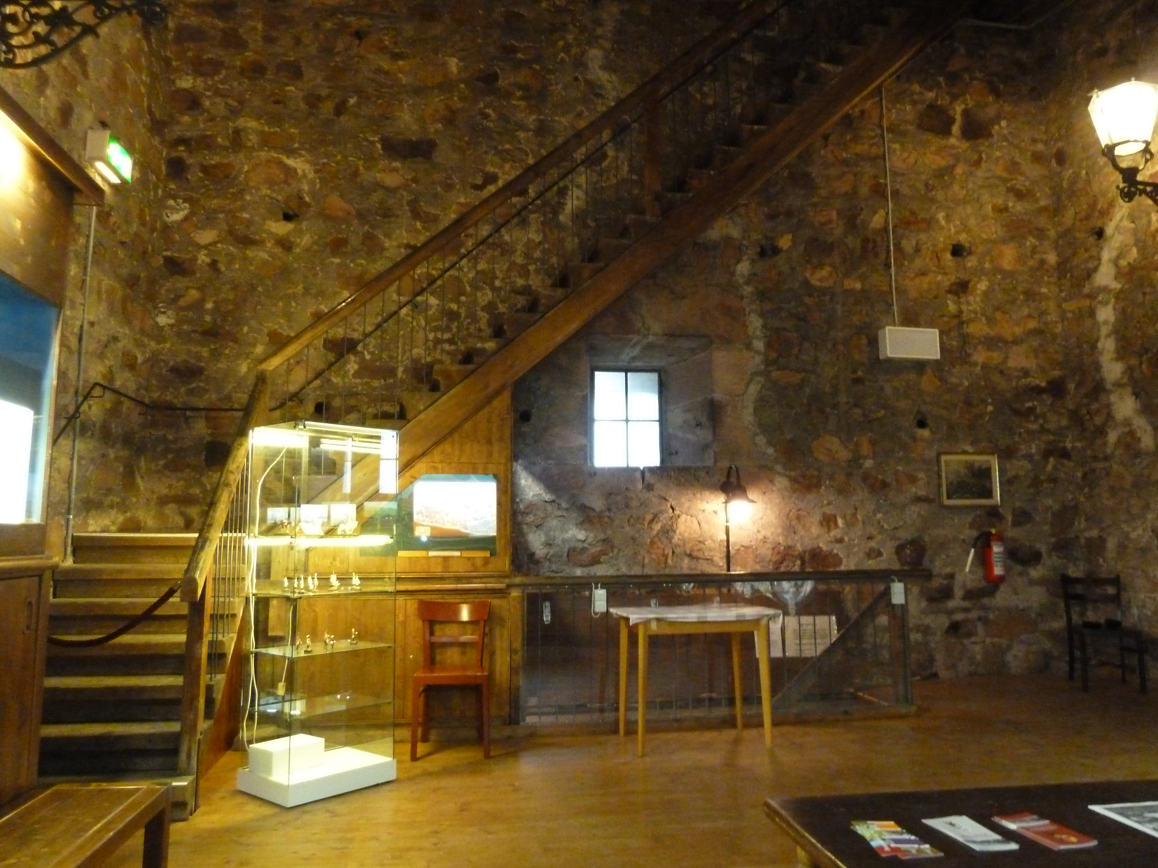 Zinnfigurenklause 2. OG im Freiburger Schwabentor